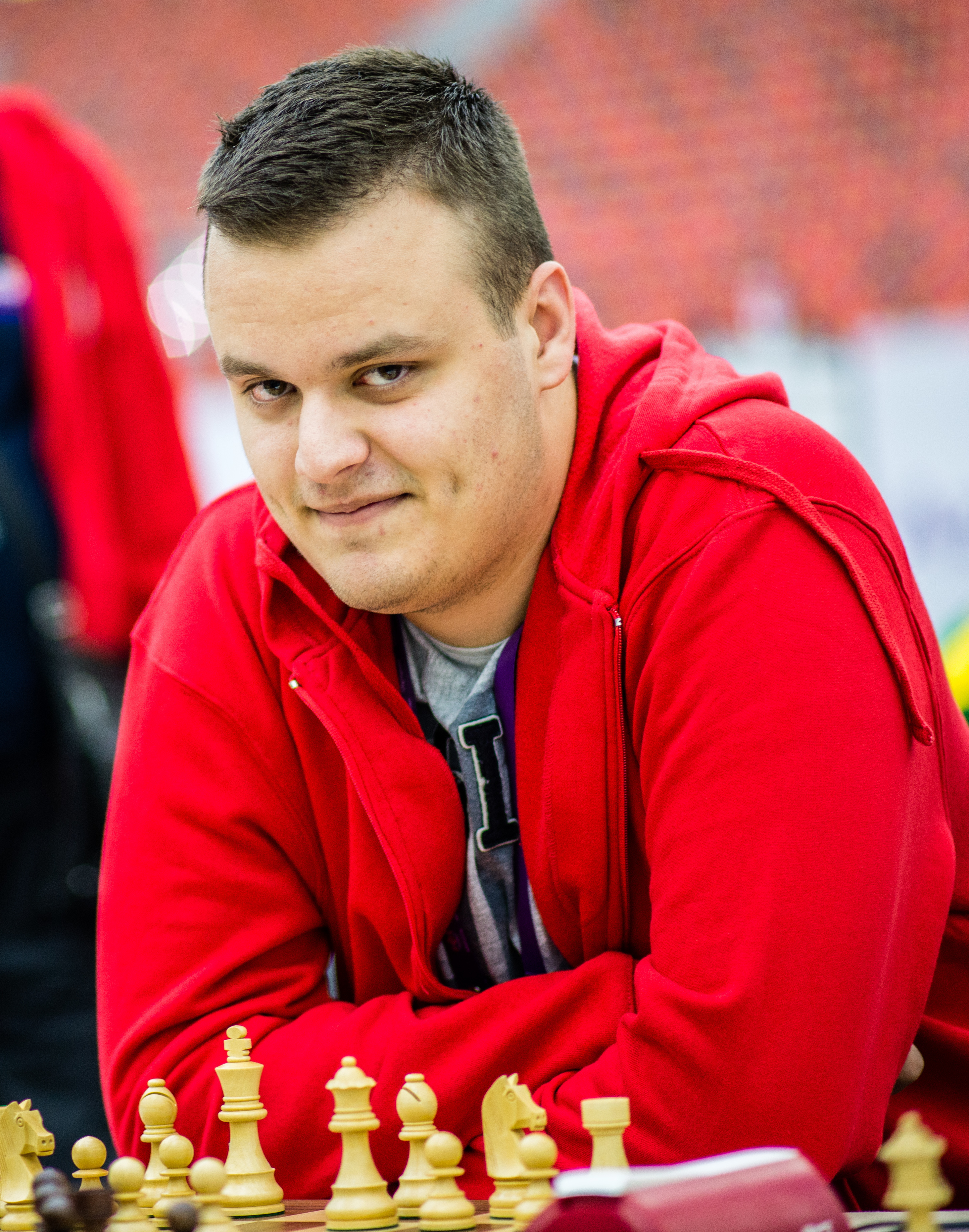 Indjic Aleksandar